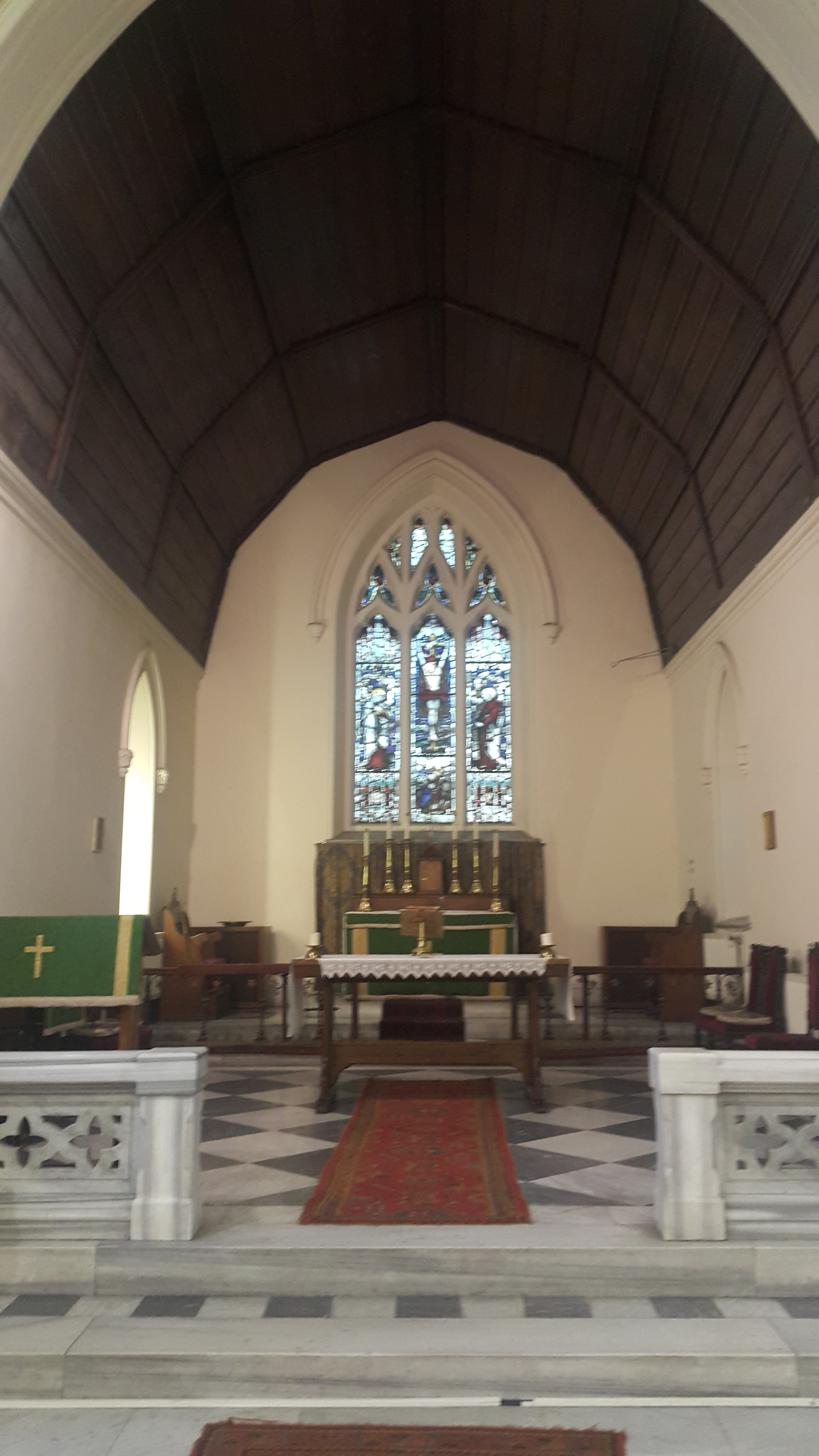 St. John the Evangelist's Anglican Church